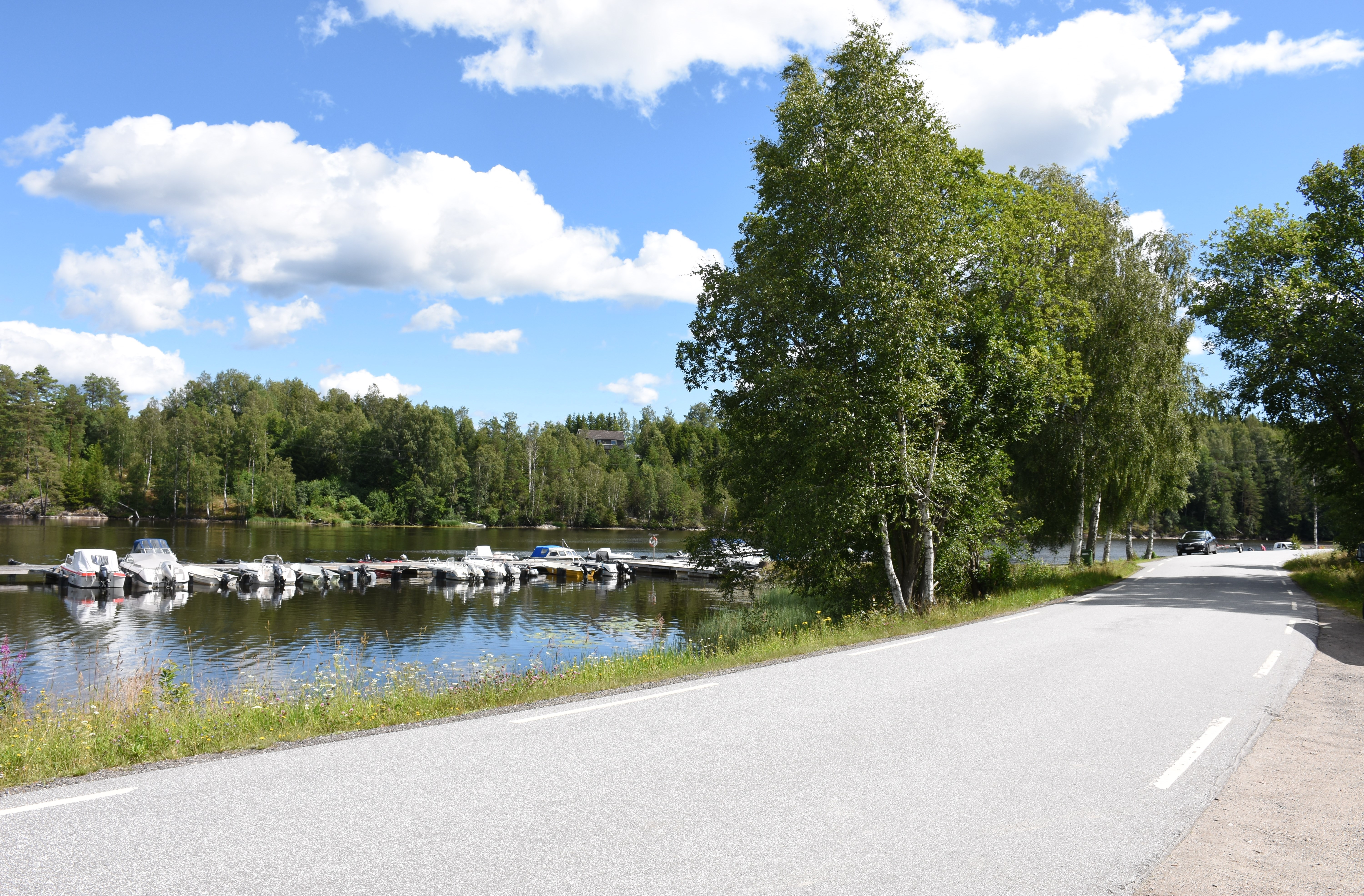 Vestsia (fylkesvei 1318) ved Skotsbergelva sør for Aremarksjøen